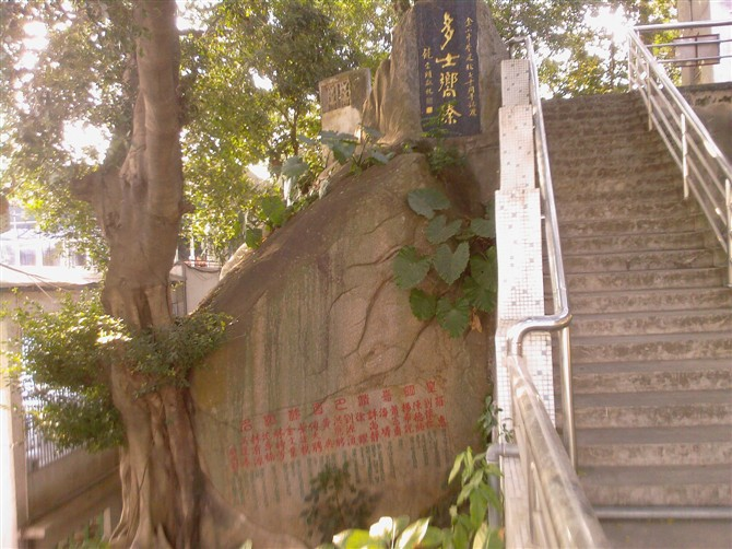 金山摩崖石刻，上方那个是“多士向臻”